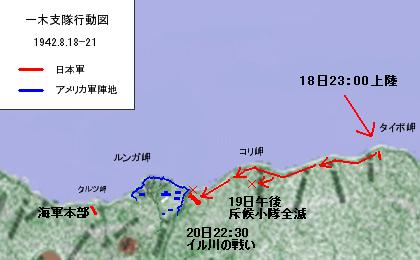 Ichiki Landing Guadalcanal.